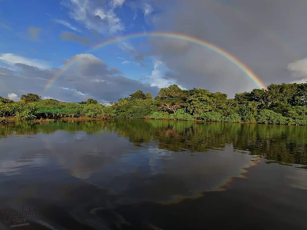 CAÑO NEGRO